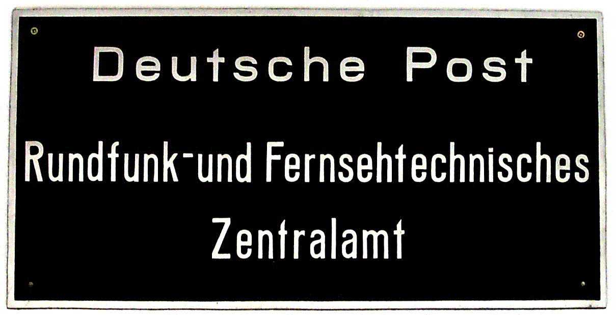 Eingangsschild des Rundfunk- und Fernsehtechnischen Zentralamtes der Deutschen Post, Reserve-Exemplar aus dem Zimmer des Amtsleiters